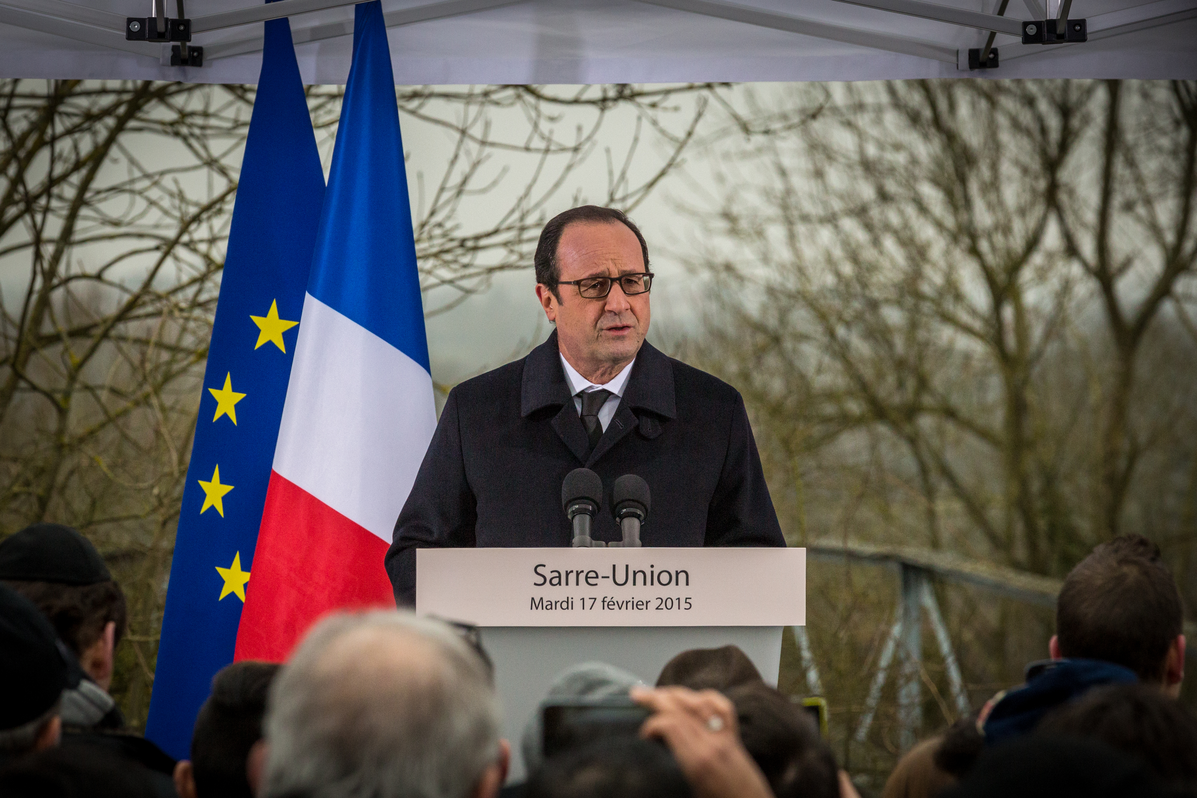 Sarre-Union allocution de François Hollande après la profanation du cimetière juif. 17 février 2015.